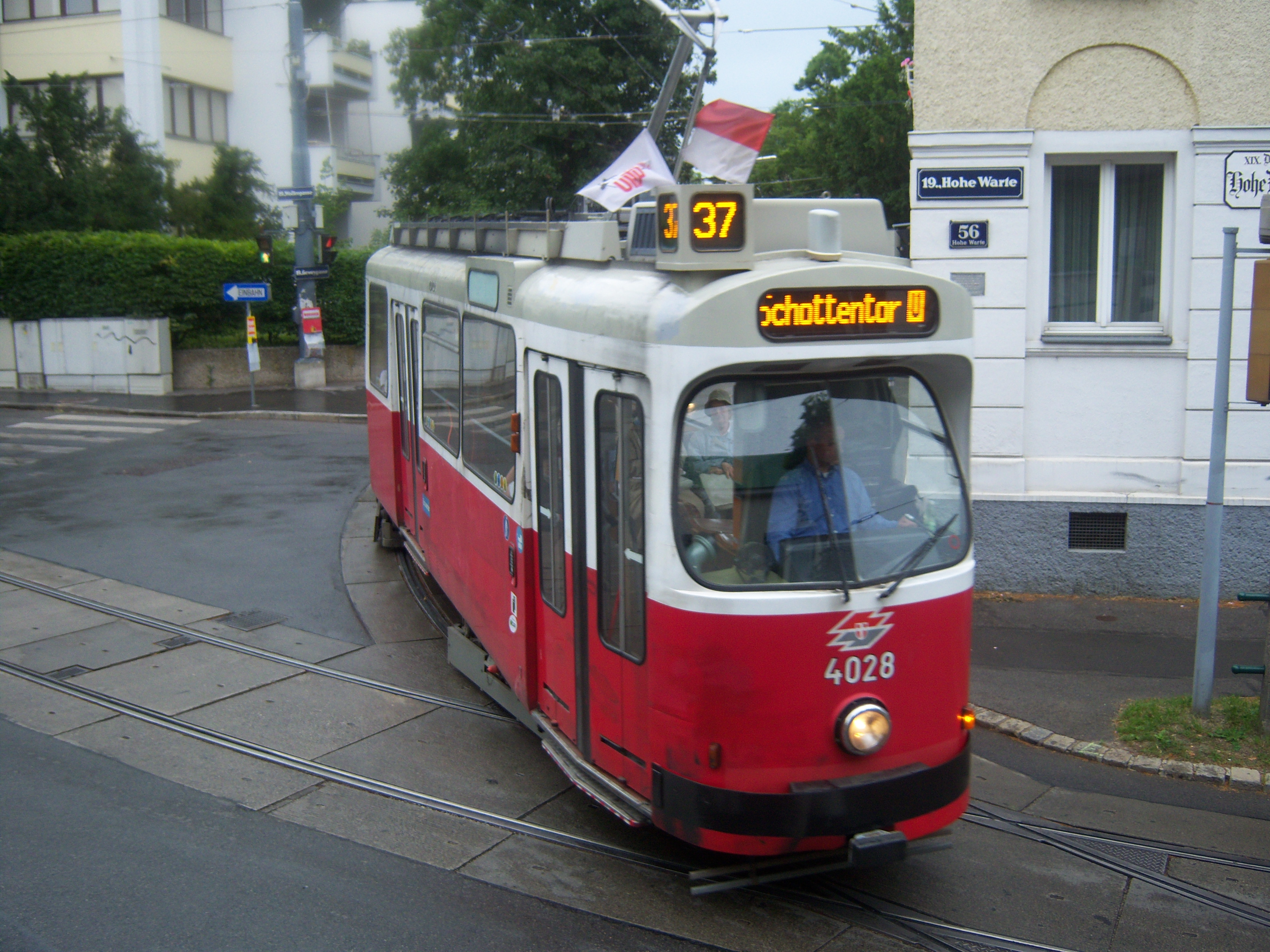 Linie 37 verlässt die Endstelle Hohe Warte in Richtung Schottentor